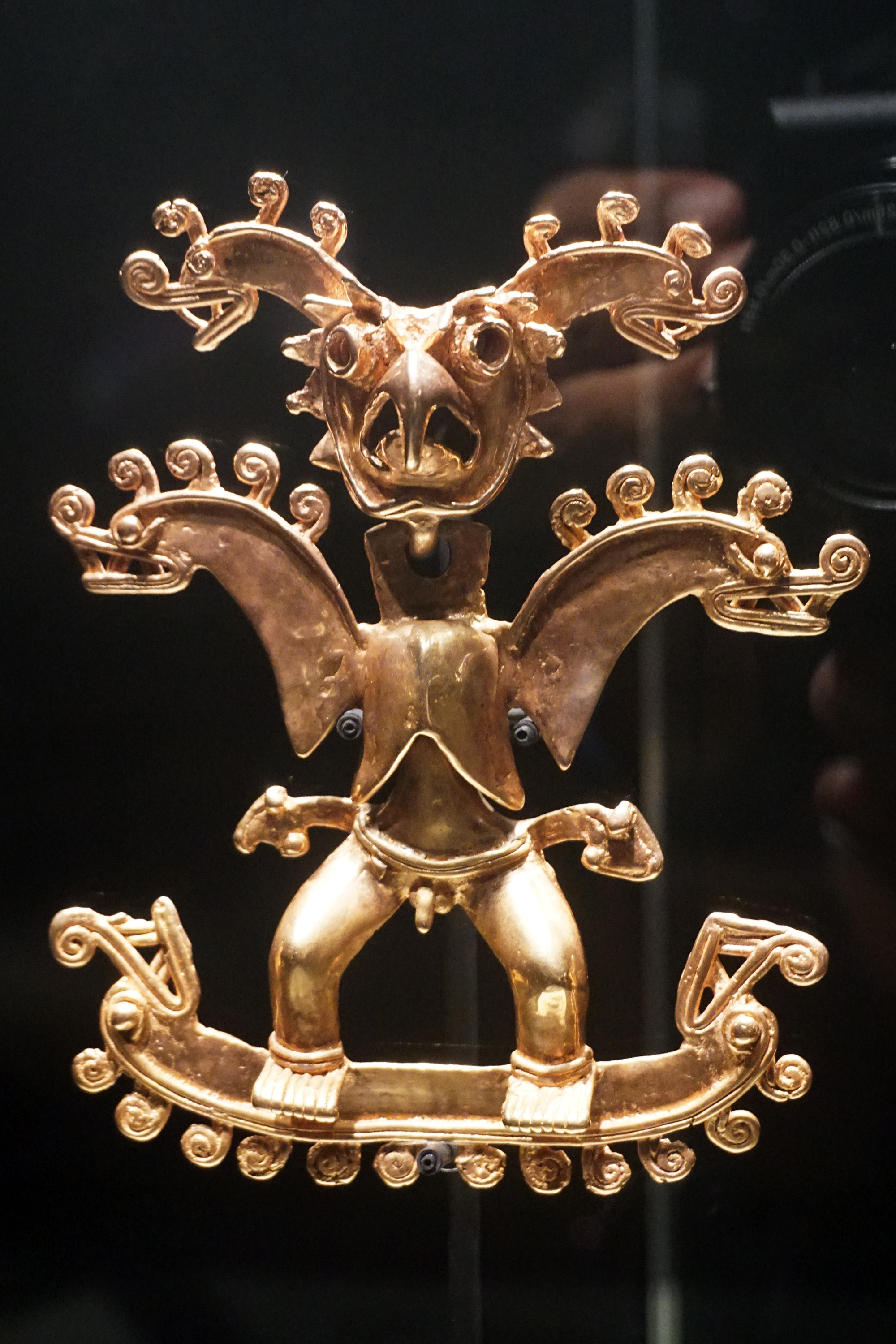 Figura de oro del Dios Sibú de los Bibrí con máscara de ave exhibida en el Museo de Oro Precolombino del Banco Central de Costa Rica